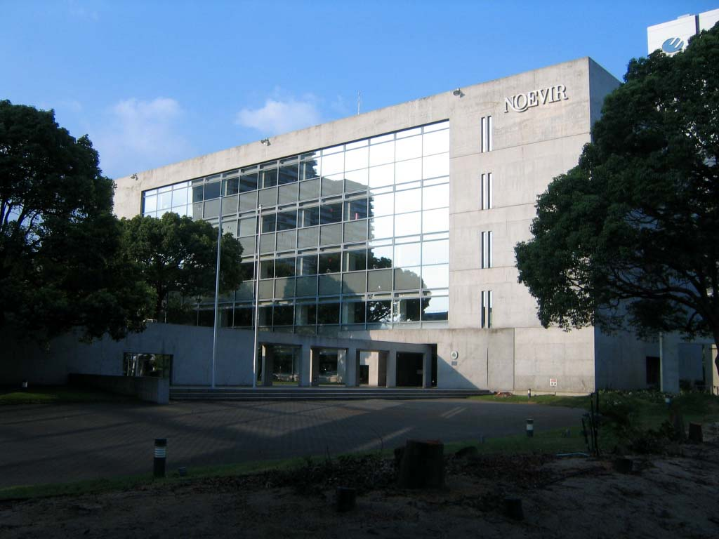 ノエビア本社(兵庫県神戸市中央区港島中町6-13-1)